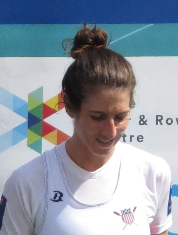 Podium LW1x NZL : MCBRIDE, Zoe GBR : WALSH, Imogen USA : BERTKO, Kathleen